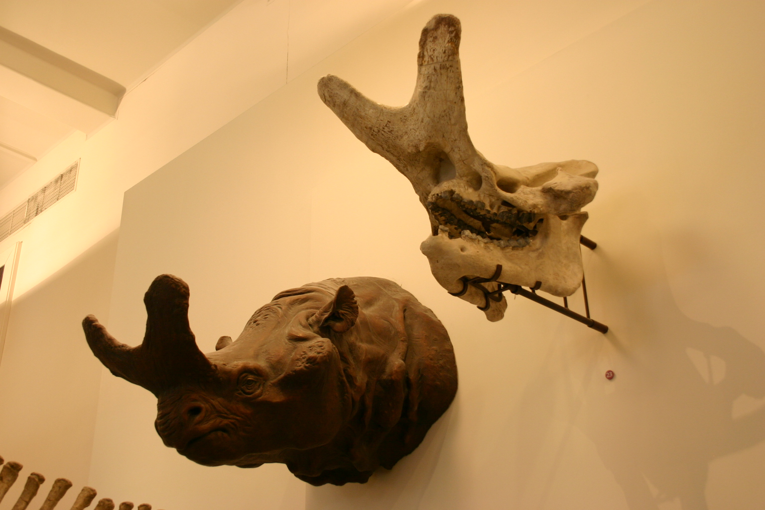 Megacerops